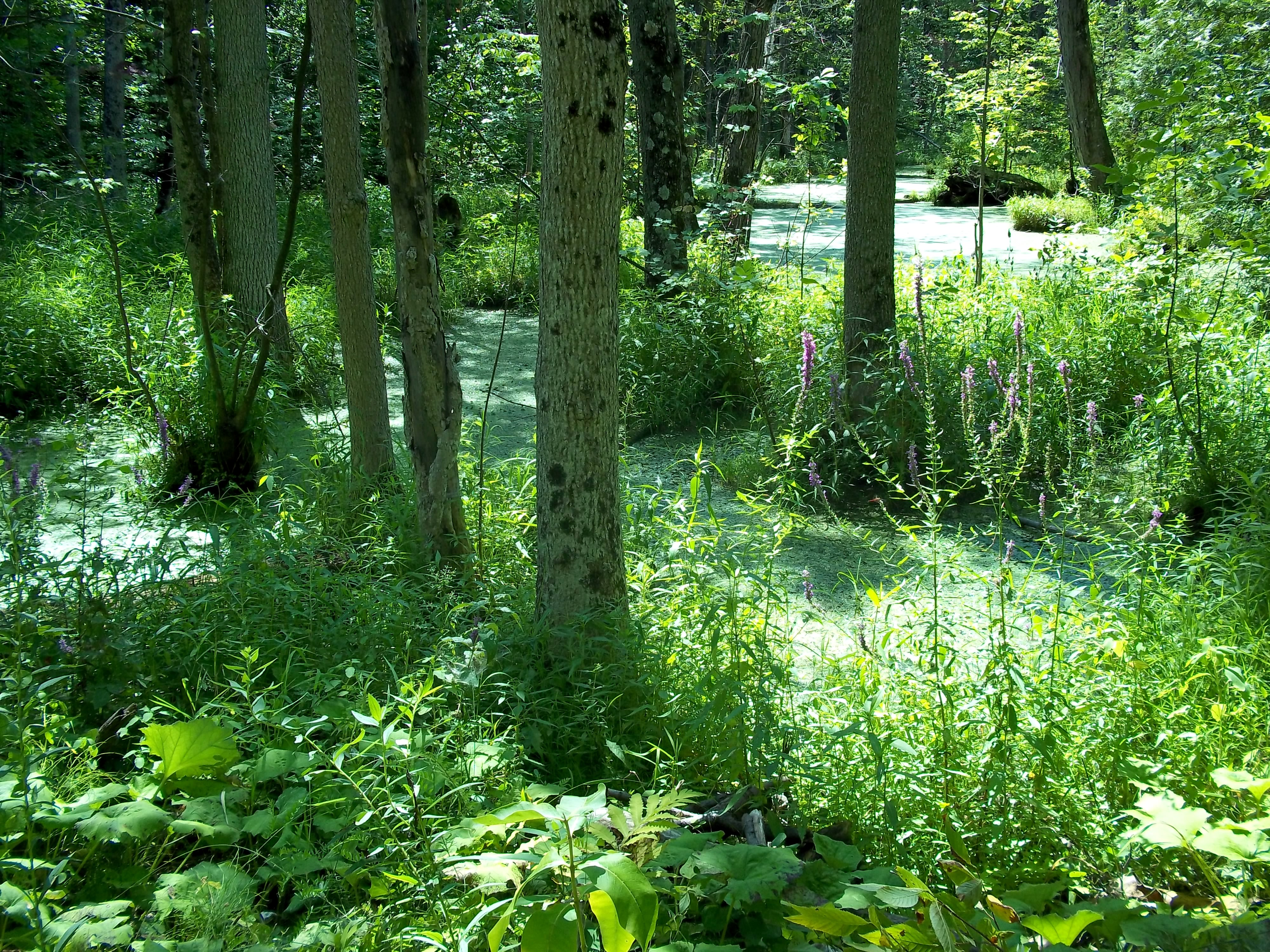 Parc-nature du Bois-de-l'Île-Bizard